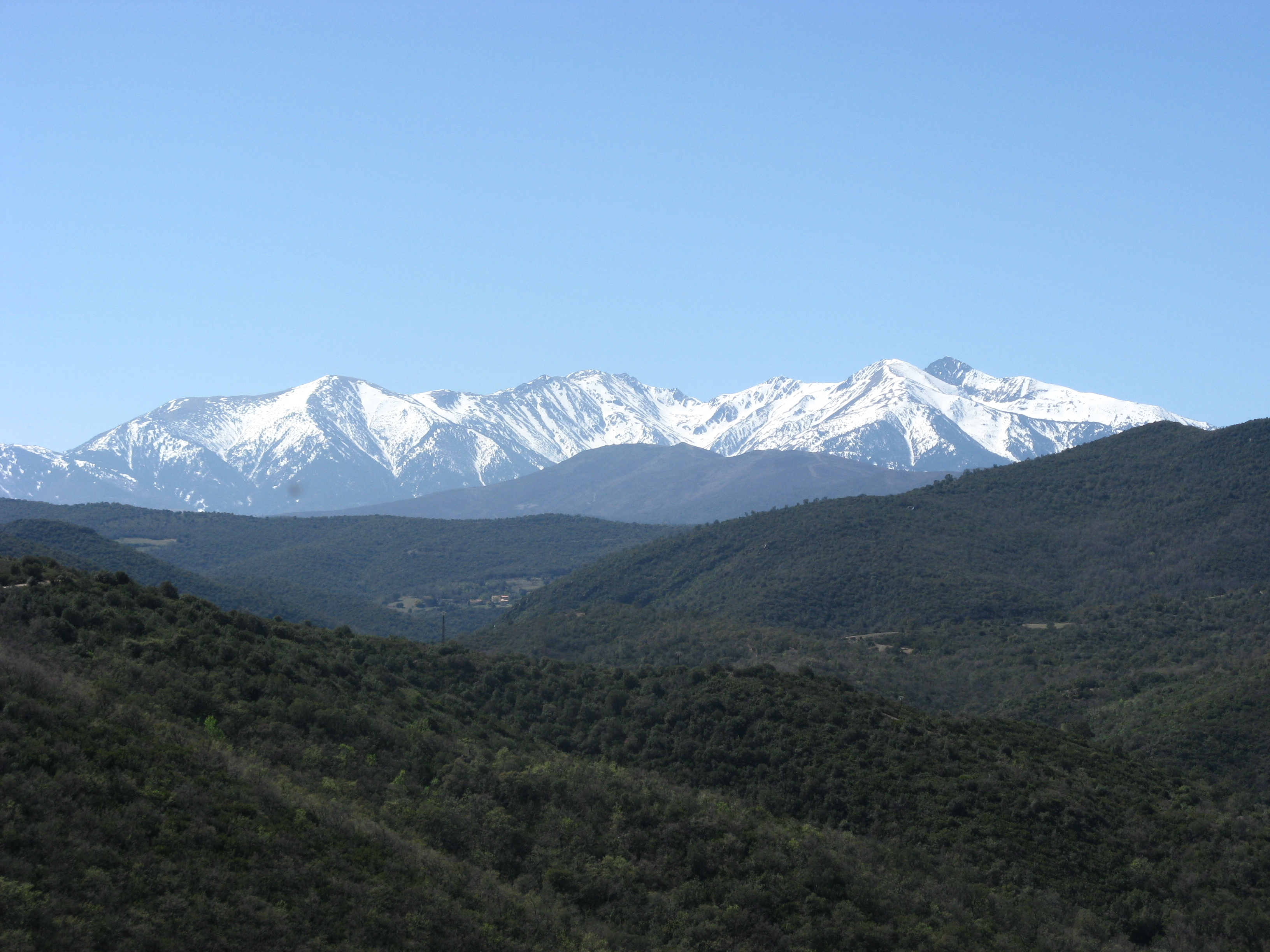 Le Canigou depuis le Montou à Corbère les Cabanes